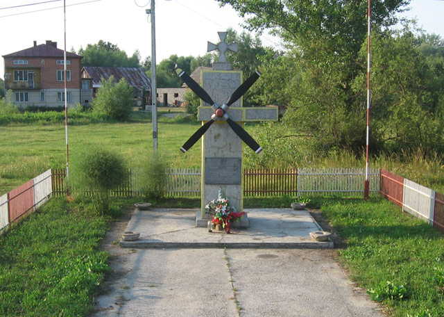 Pomnik w Sadkowej Górze.